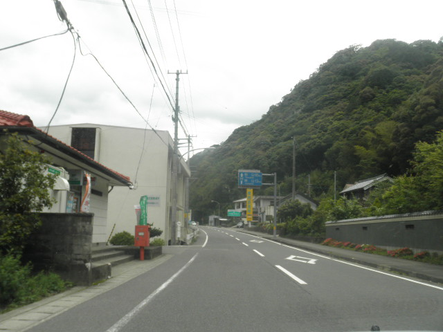 徳島県名東郡佐那河内村下高樋 国道438号